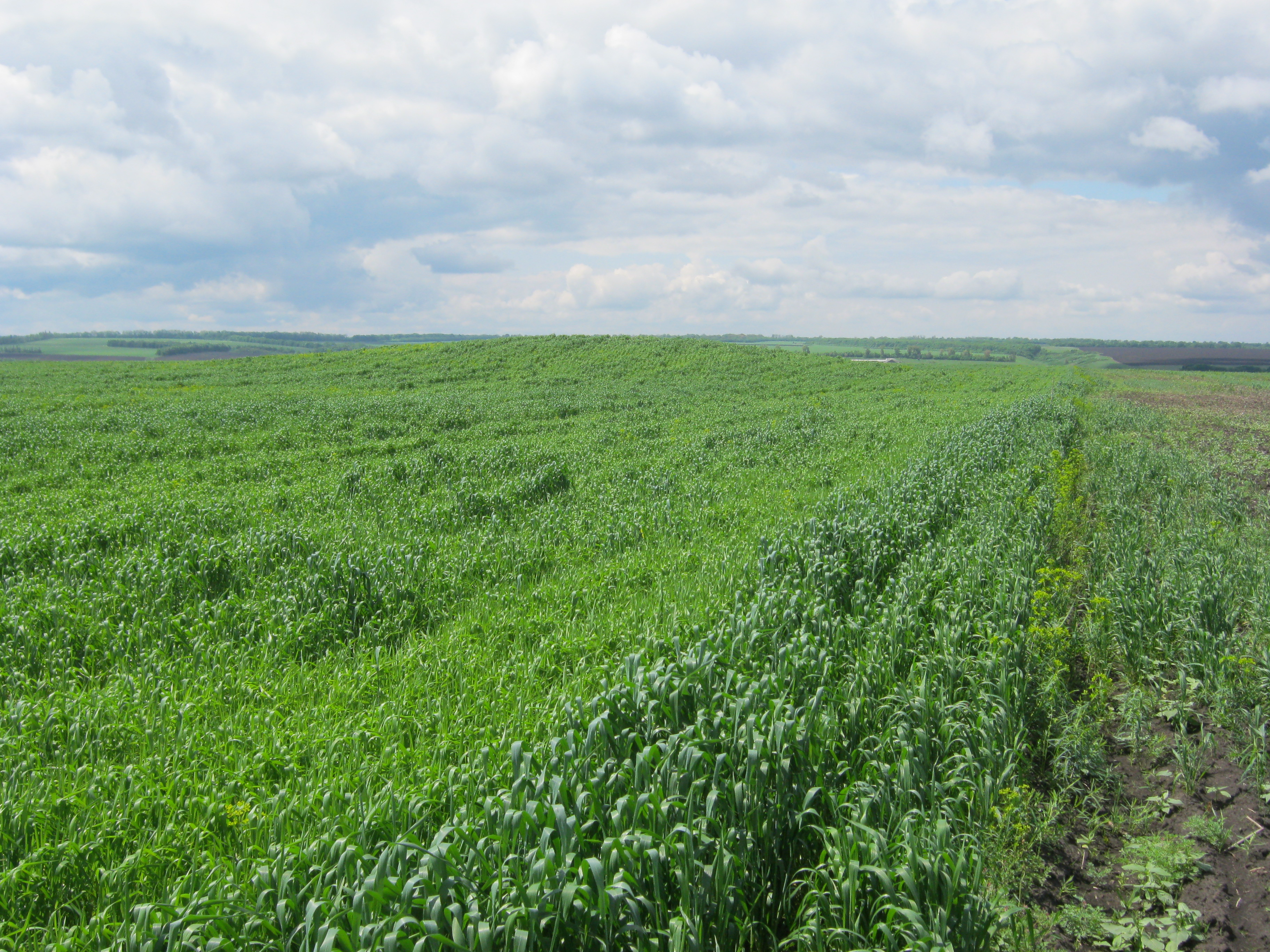 Кургани. 10., Верхня Орілька